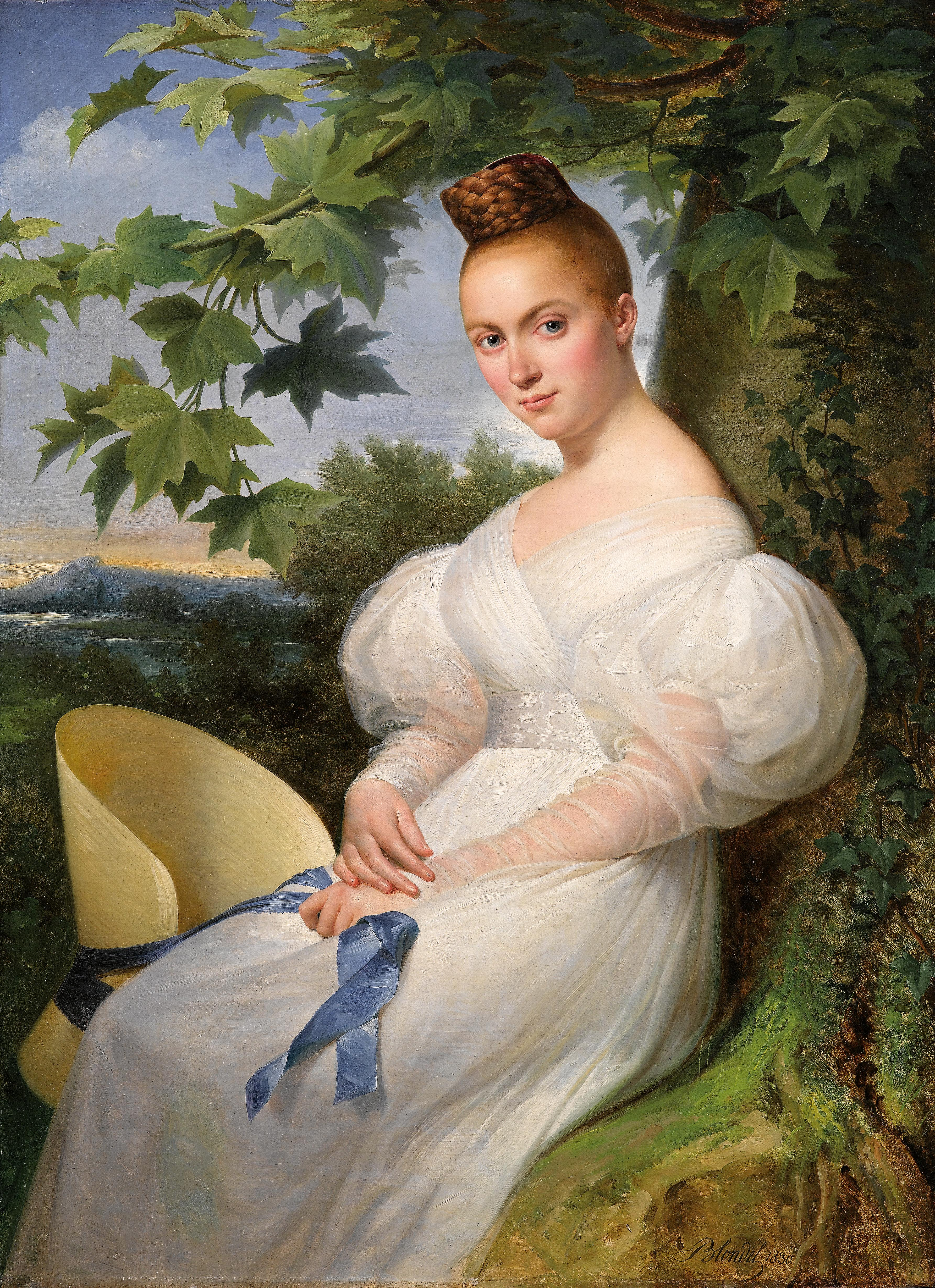 Bildnis einer jungen Frau mit Strohhut